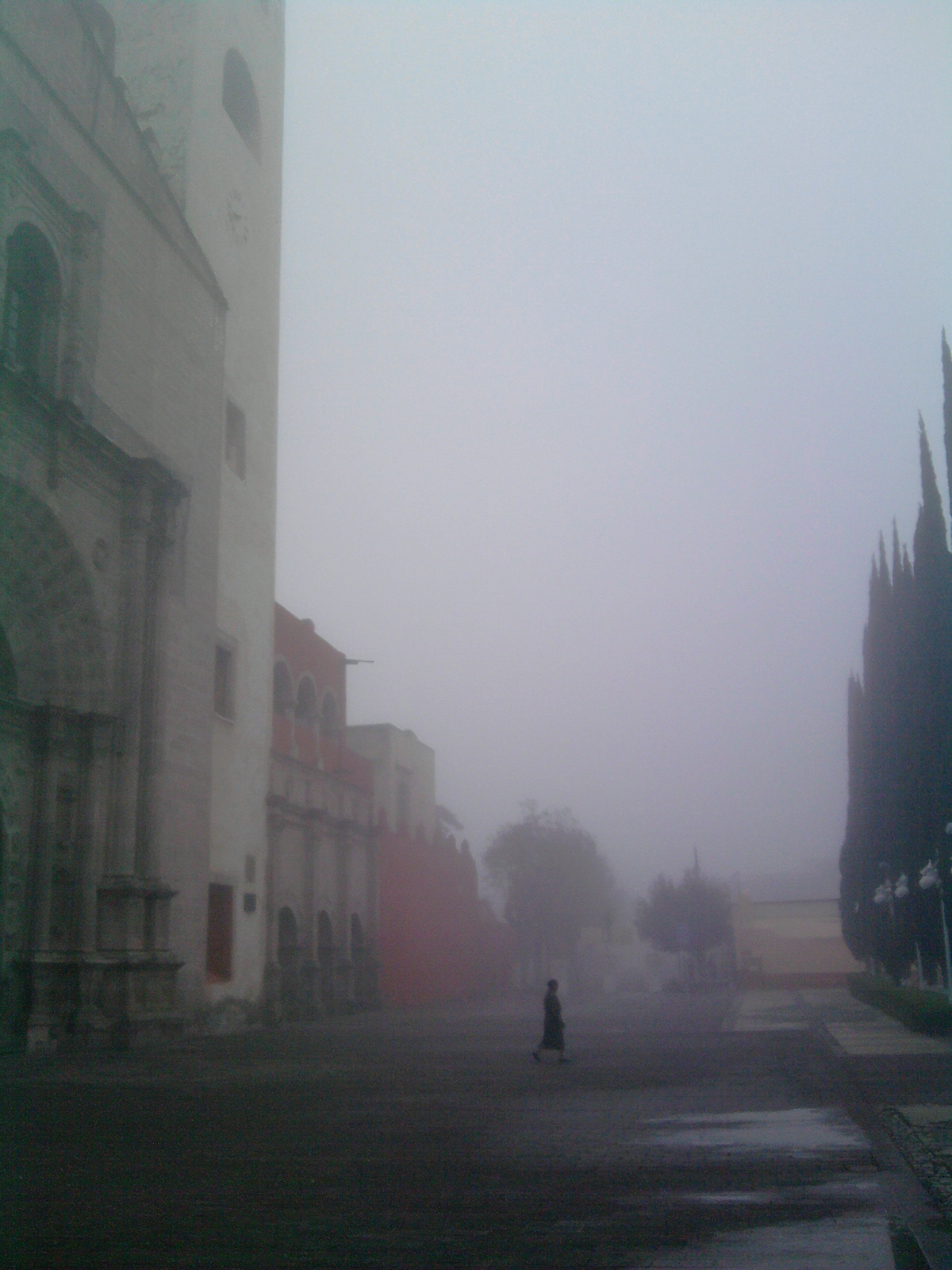 Mañana con neblina en Actopan, Hidalgo, México.